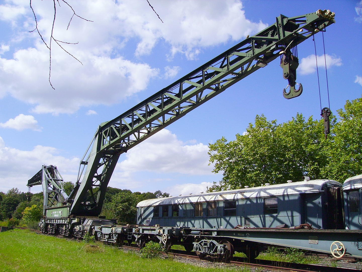 Le Diplodocus avec ses wagons de servitudes au 5ème régiment du Génie de Versailles le 23 août 2008.